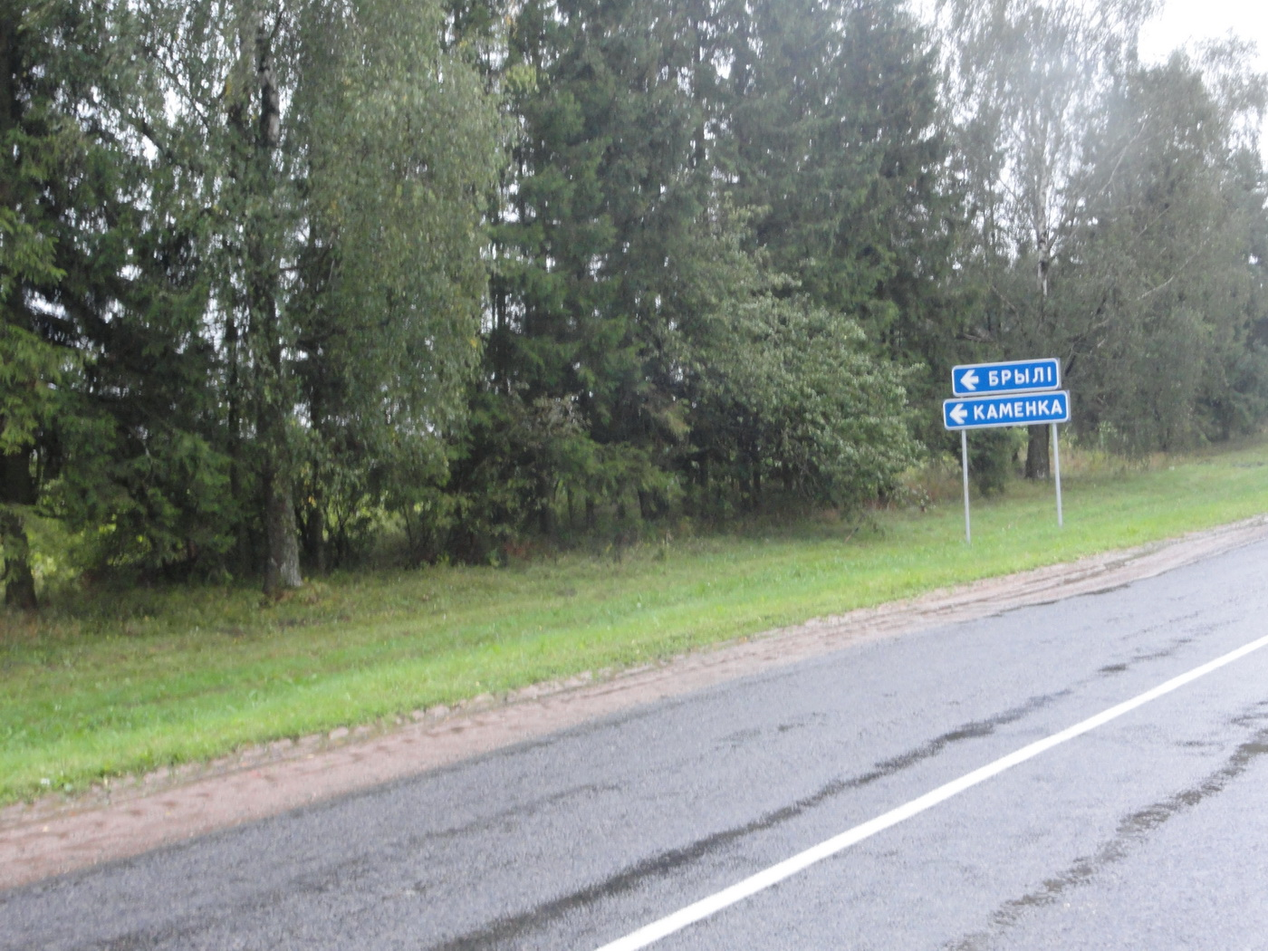 Указатель на Каменку